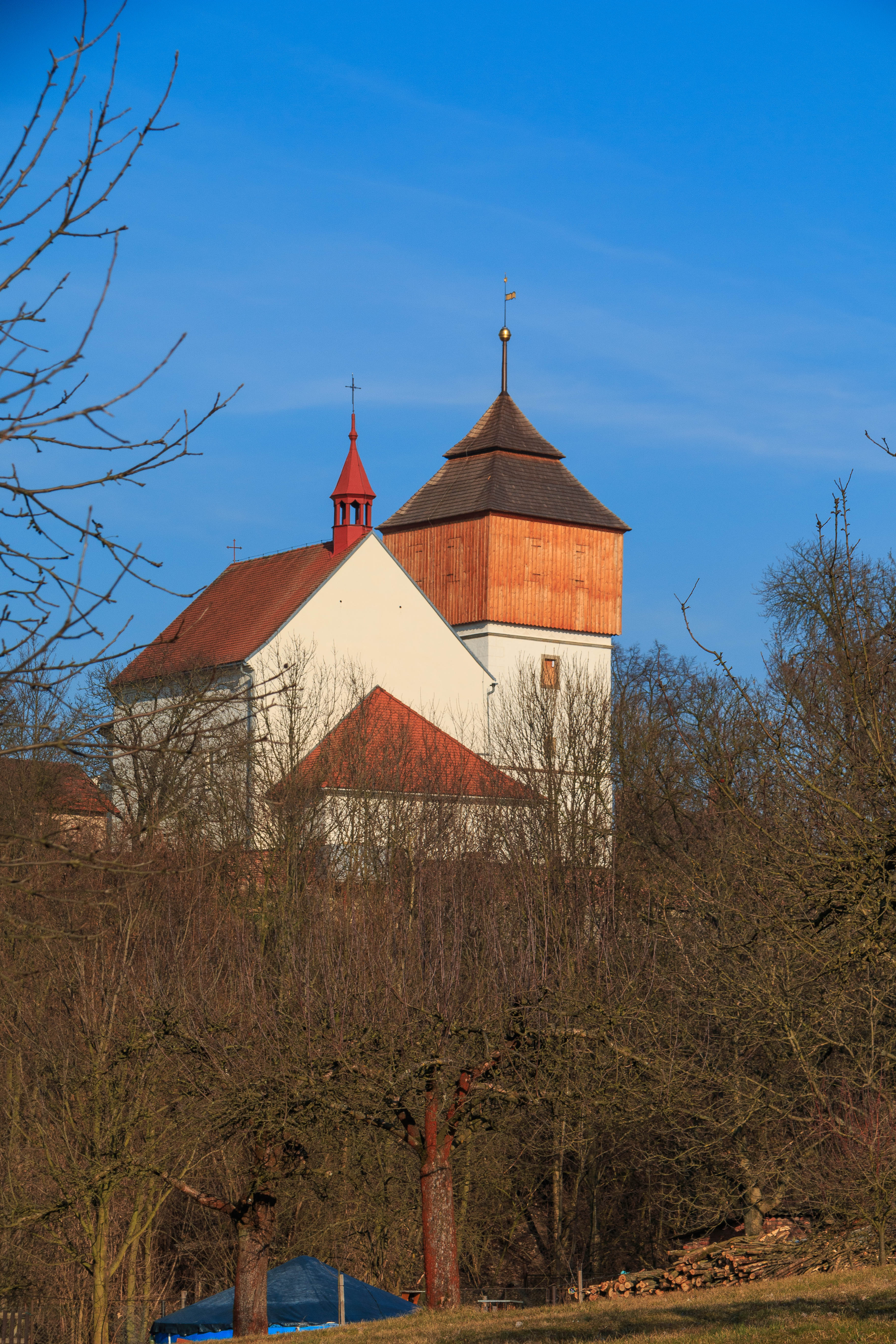 Kostel svatého Jakuba Staršího s tvrzištěm, jihozápadní část vsi, Černčice (okres Náchod).